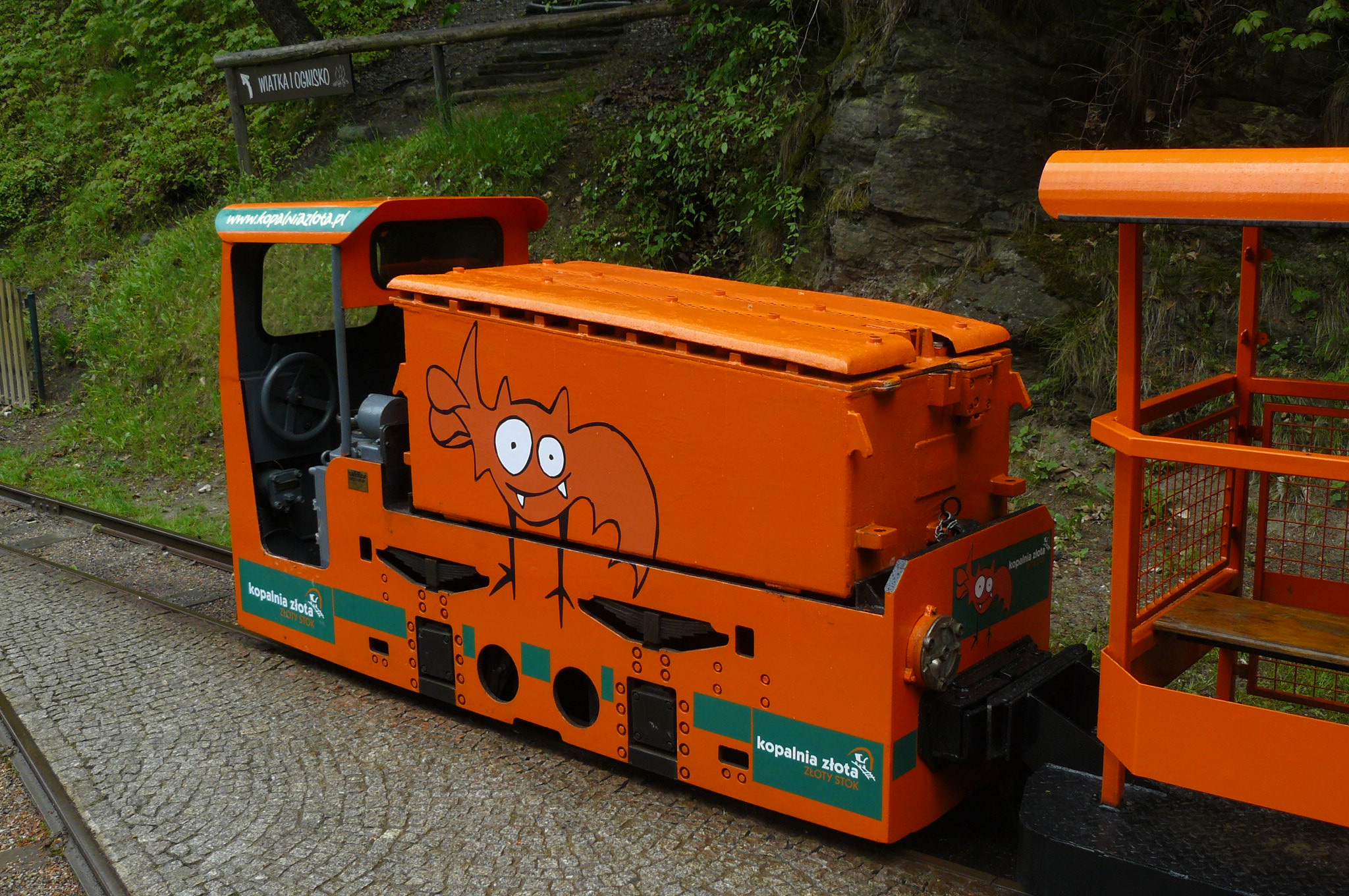 Muzeum Kopalni Złota w Złotym Stoku - podziemna kolej kopalniana.